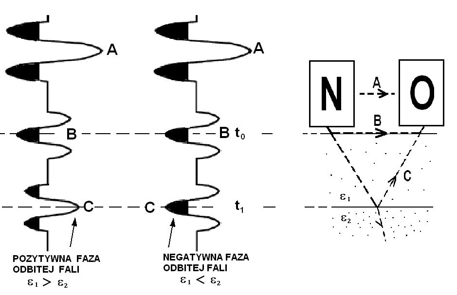 Odbicie fali elektromagnetycznej w metodzie georadarowej